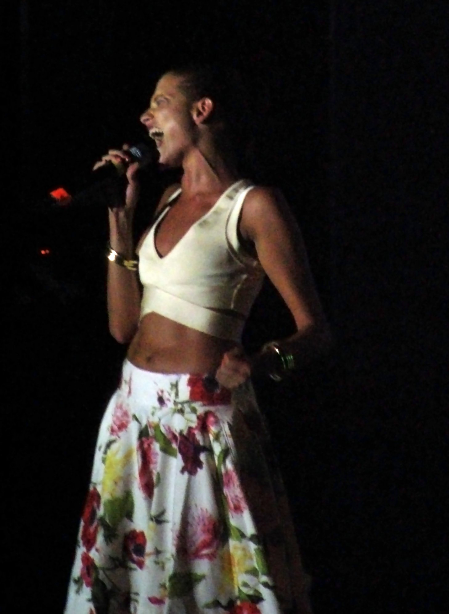 Natalia Jiménez performing in Garza García, Nuevo León, Mexicola quinta estación